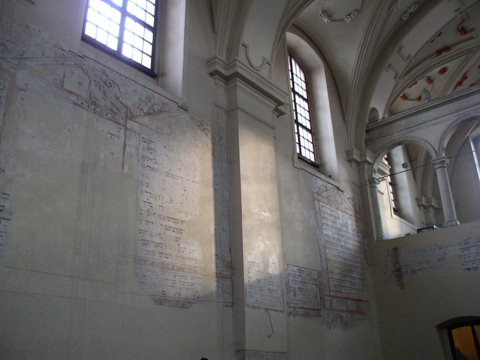 Interior of Isaac Synagogue, Kazimierz, Kraków, Poland.